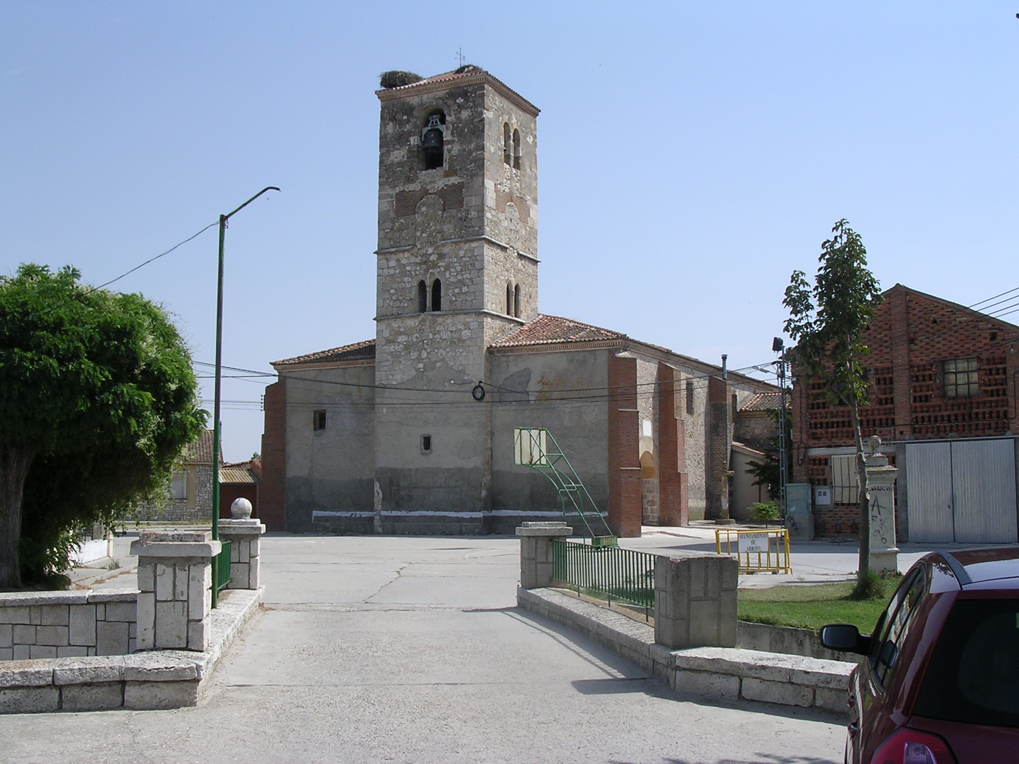 Torre de la iglesia de Arroyo de Cuellar, Segovia, España